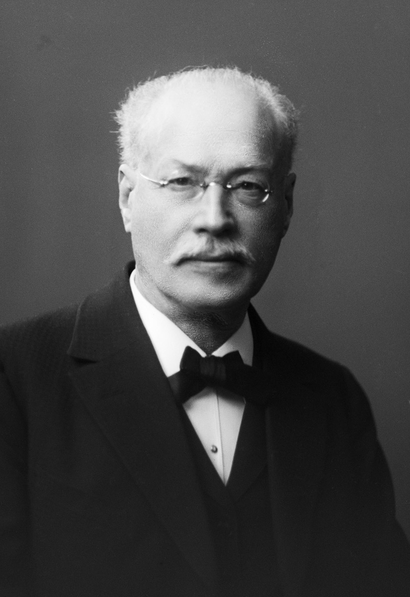 Hinke Bergegren (porträtt från Stockholmskällan)